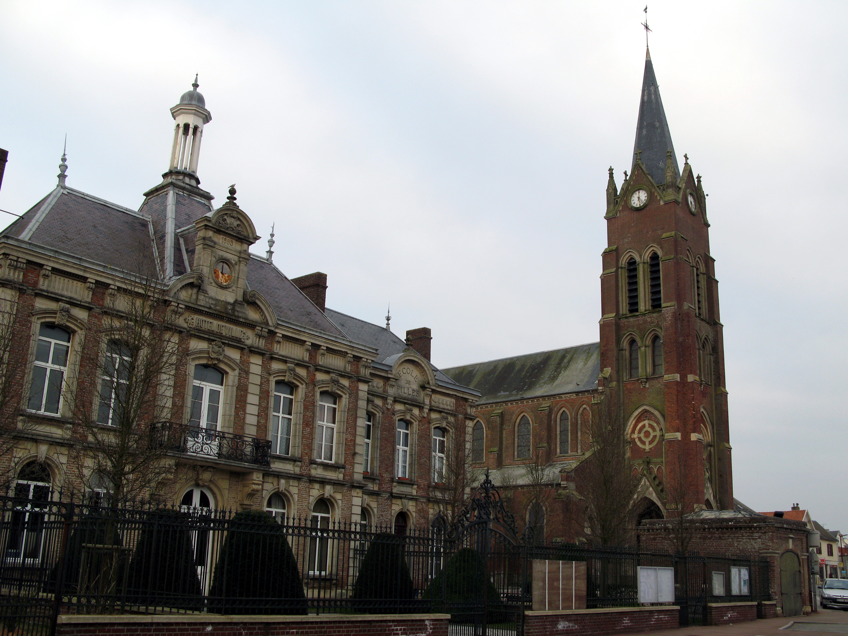 Beaucamps-le-Vieux (Somme, France) - L'hôtel-de-ville et l'église. . .